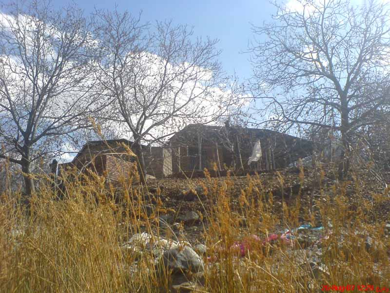 سرمشک